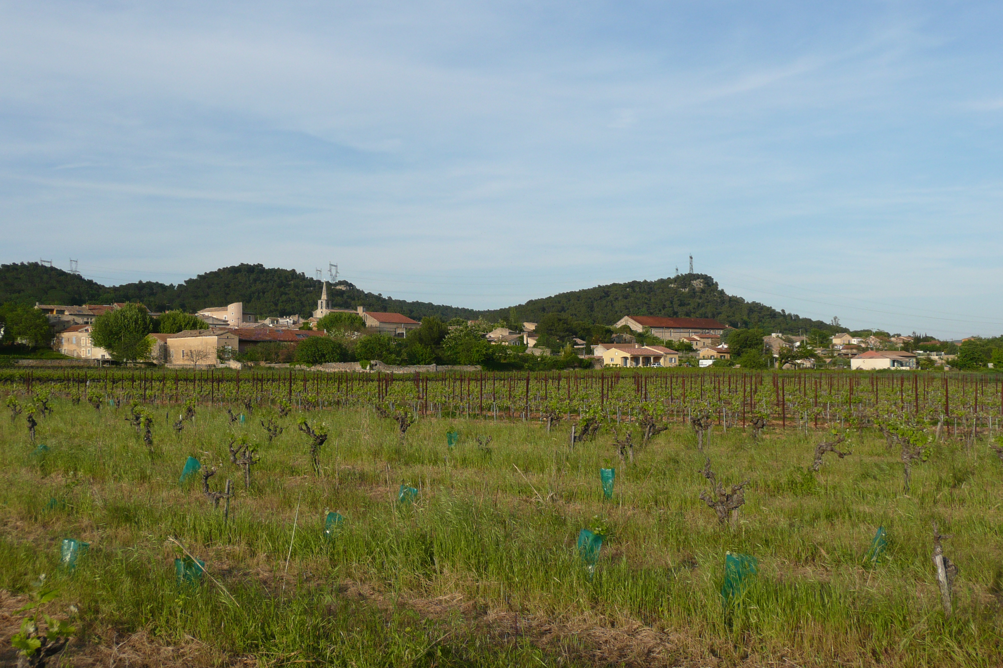 Vue d'ensemble de Saint-Gervais (Gard).